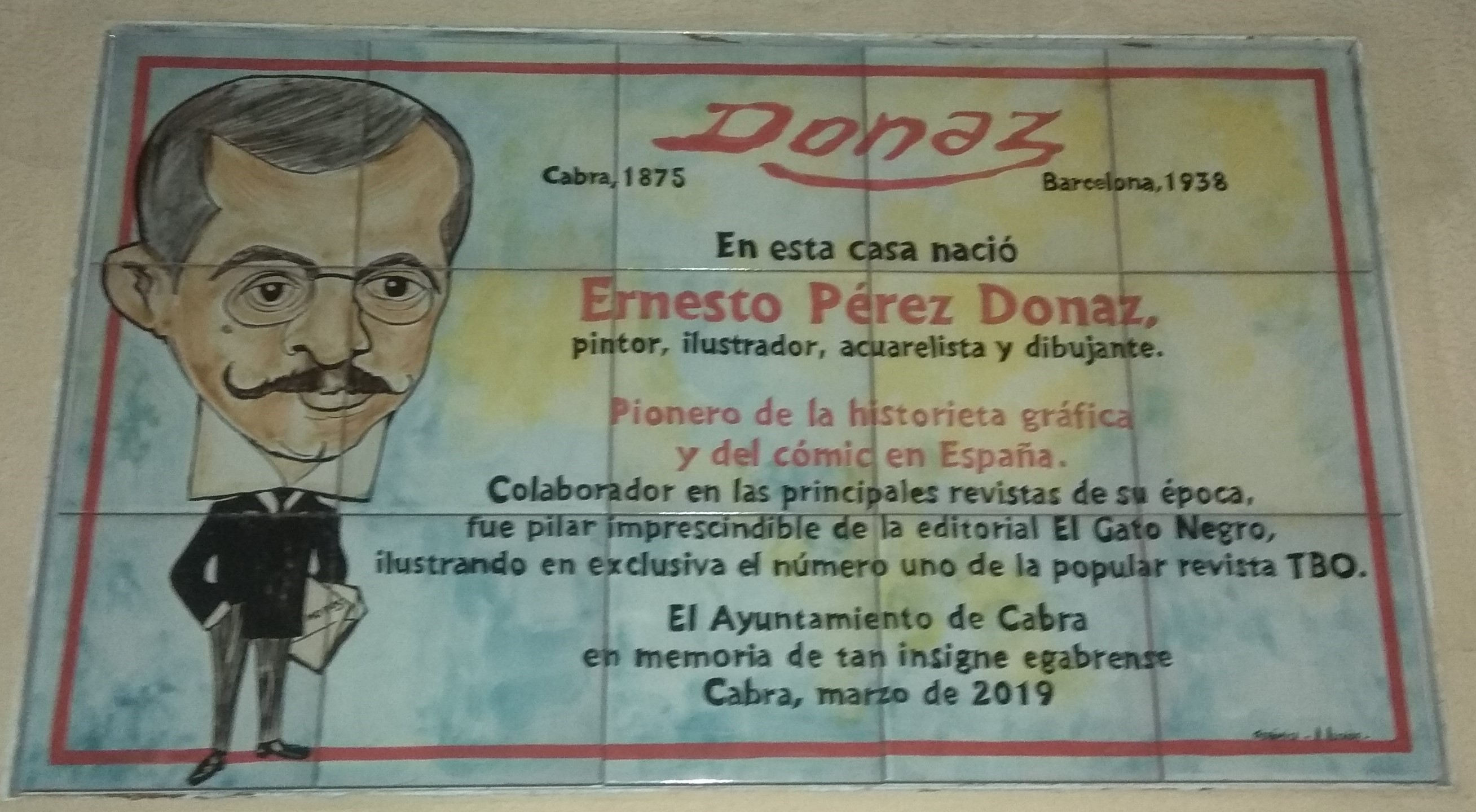 Azulejo conmemorativo en la casa natal de Ernesto Pérez Donaz en Cabra (Córdoba)